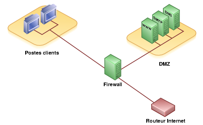 Se trata de una zona desmilitarizada